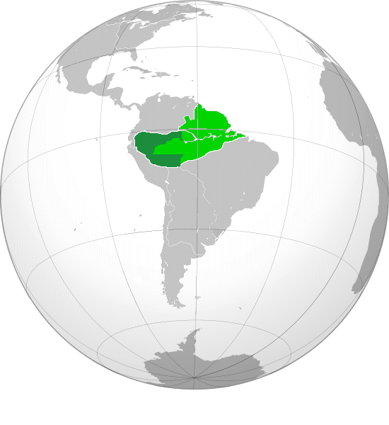 Capitania general de Maynas dentro del imperio español